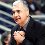 Žemaitėška: Dragans Šakota